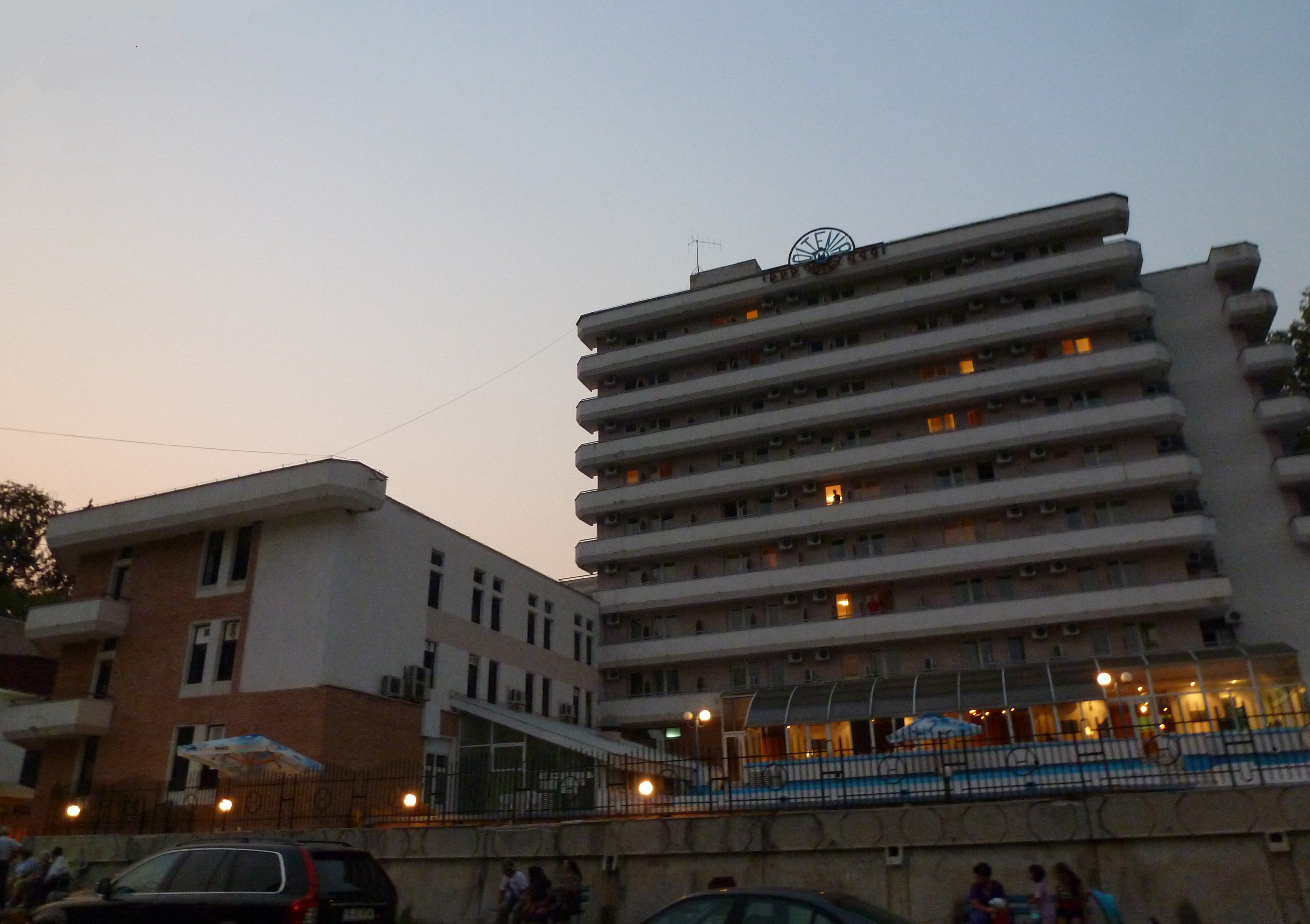 Hotelul Oltenia din Băile Govra